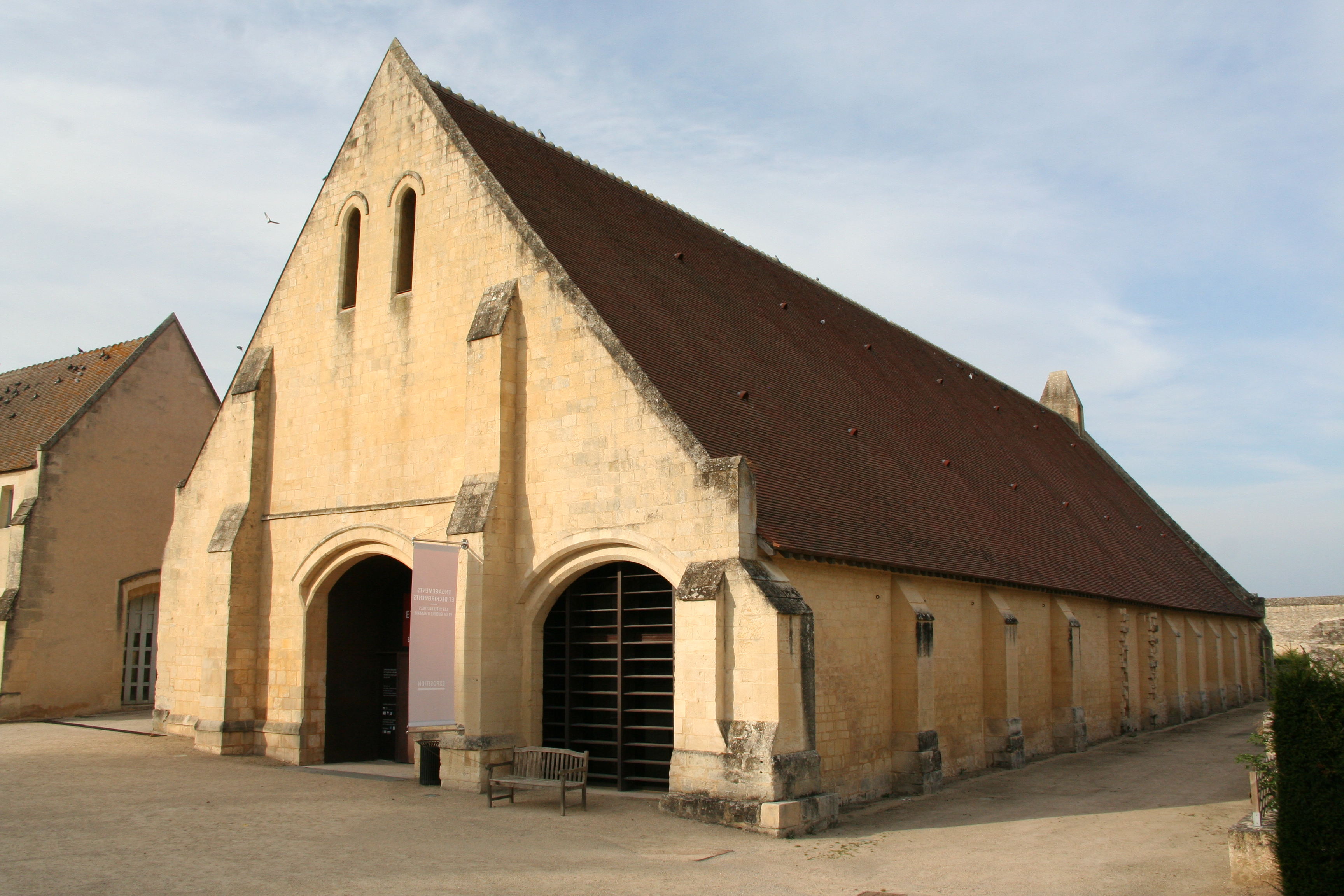 Saint-Germain-la-Blanche-Herbe (Calvados, France), ancienne abbaye d'Ardenne classée M.H..